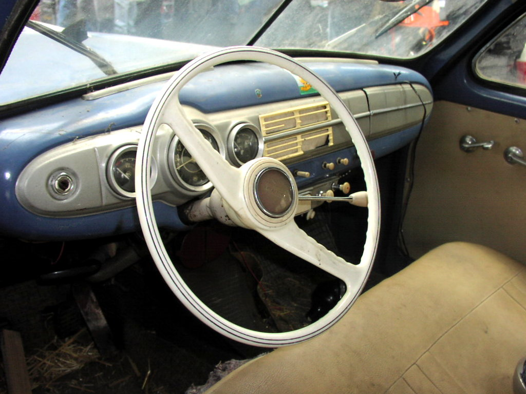 Škoda 1201 Estate